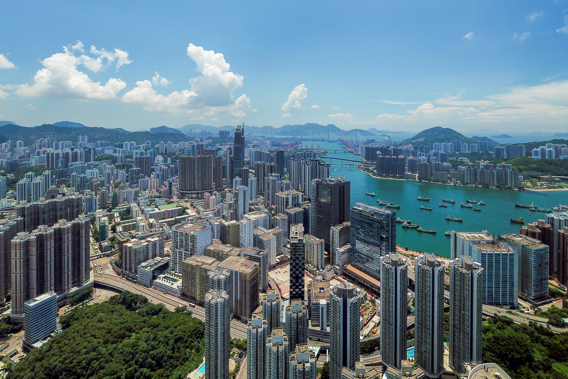 Chai Wan Kok